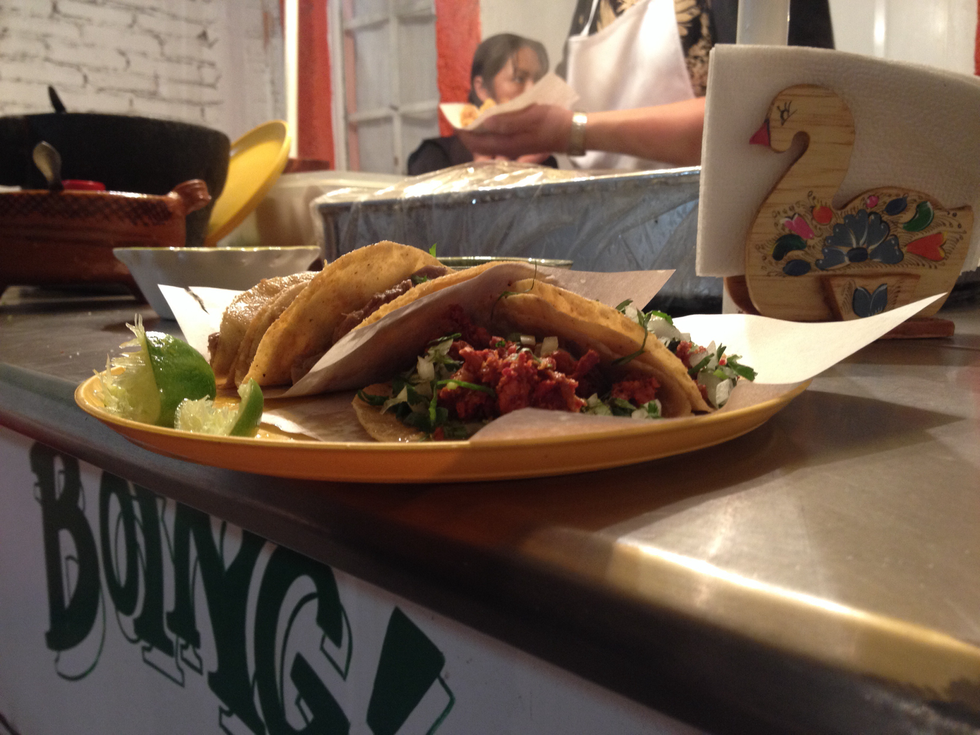 Taco de longaniza, platillo típico mexicano. Puebla, Puebla, México.